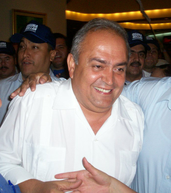 José Guadalupe Osuna Millán. Grand Hotel Lobby at Tijuana, Baja California, Mexico.